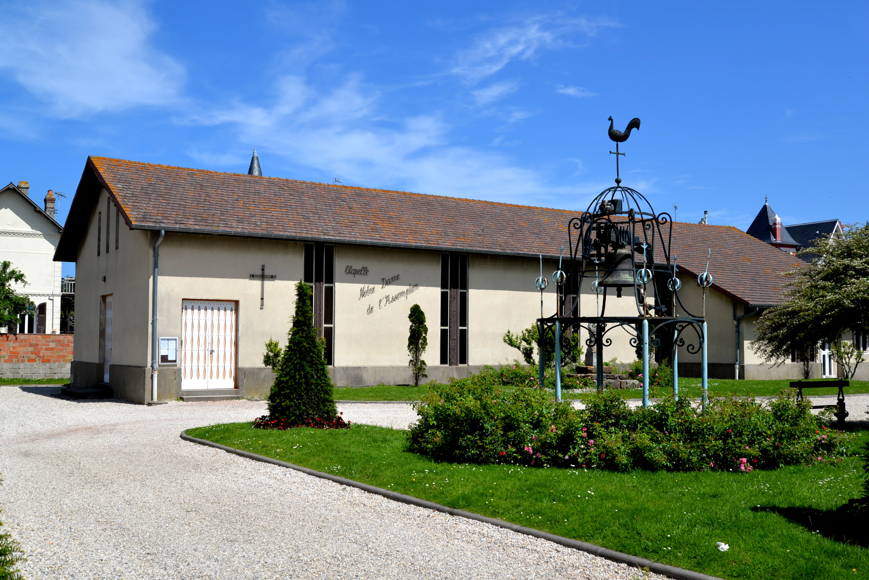 Blonville-sur-Mer (Calvados)